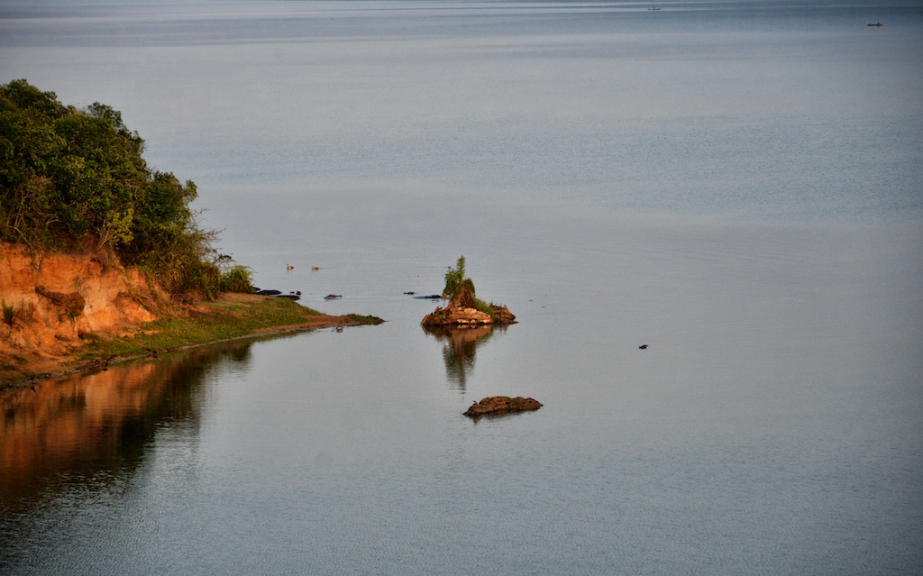 Lake Albert Channel, Uganda